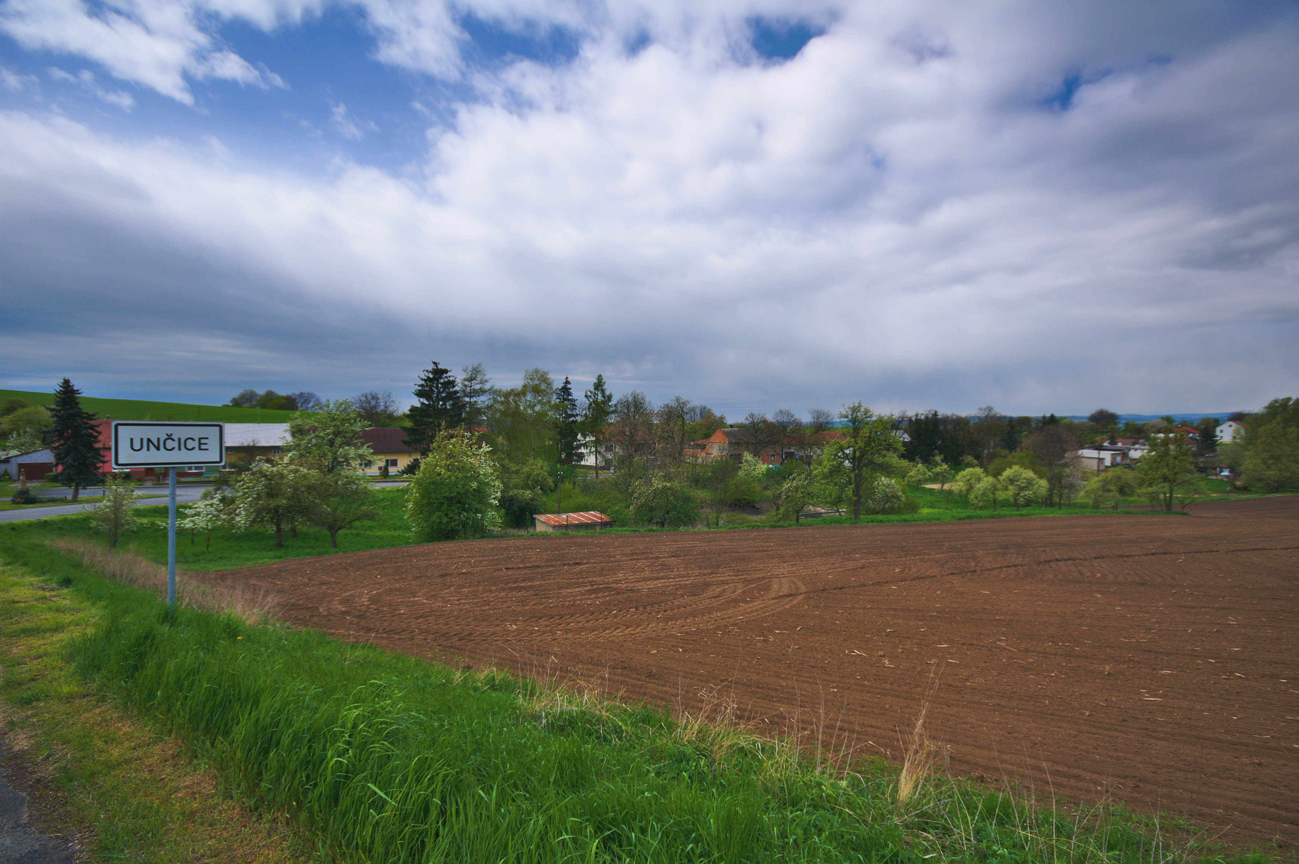 Pohled na obec od východu, Unčice, Pavlovice u Kojetína, okres Prostějov